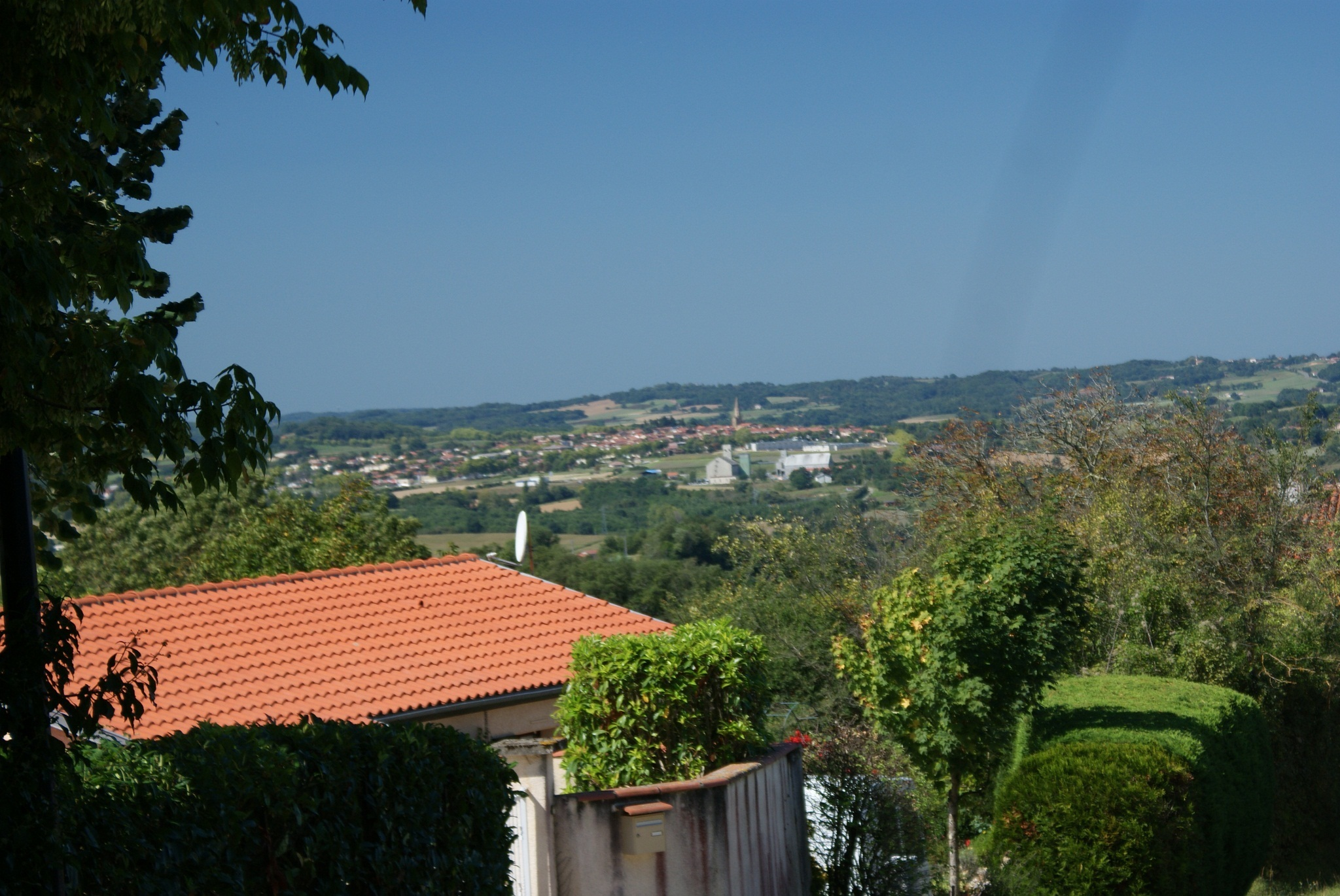 Vanaf de D55D (Haute-Garonne) in Frankrijk is vanuit Mondilhan het dorp Boulogne sur Gesse te zien.